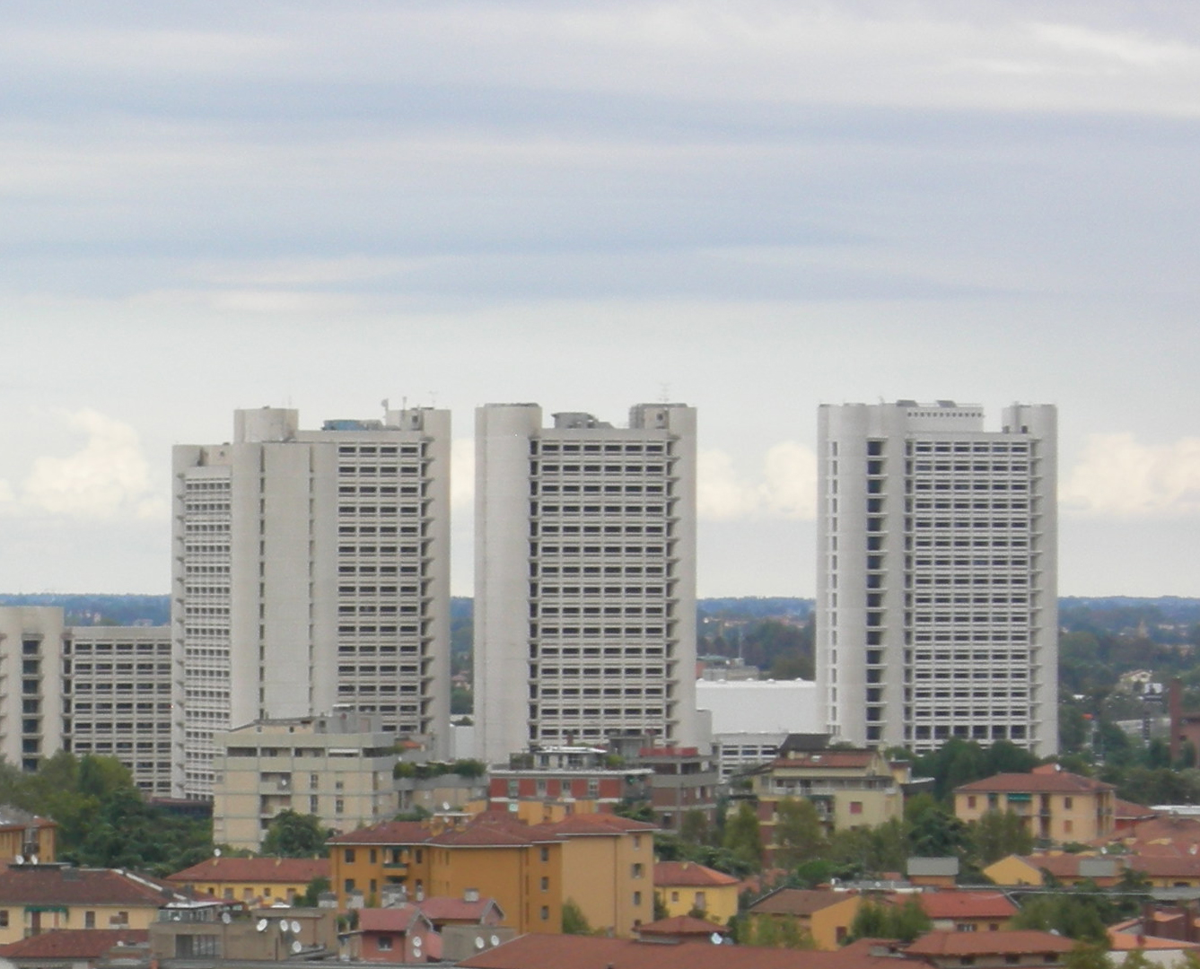 Fiera District veduta dalla Specola di Palazzo Poggi, Bologna